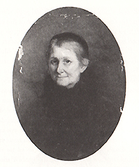 Carolina Bock (1792-1872) spelar titelrollen i Orleanska jungfrun av Schillers